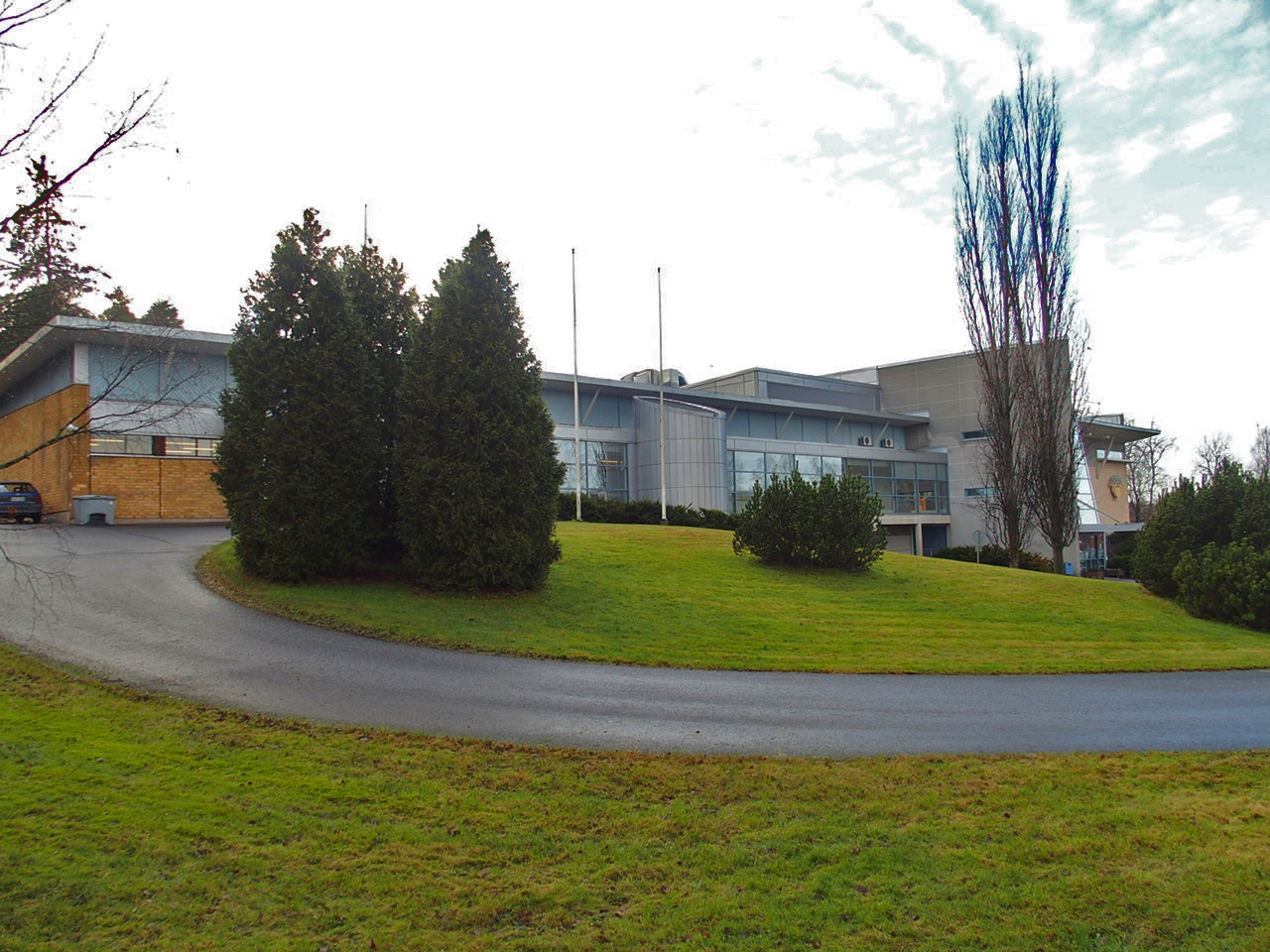 Raision uimahalli